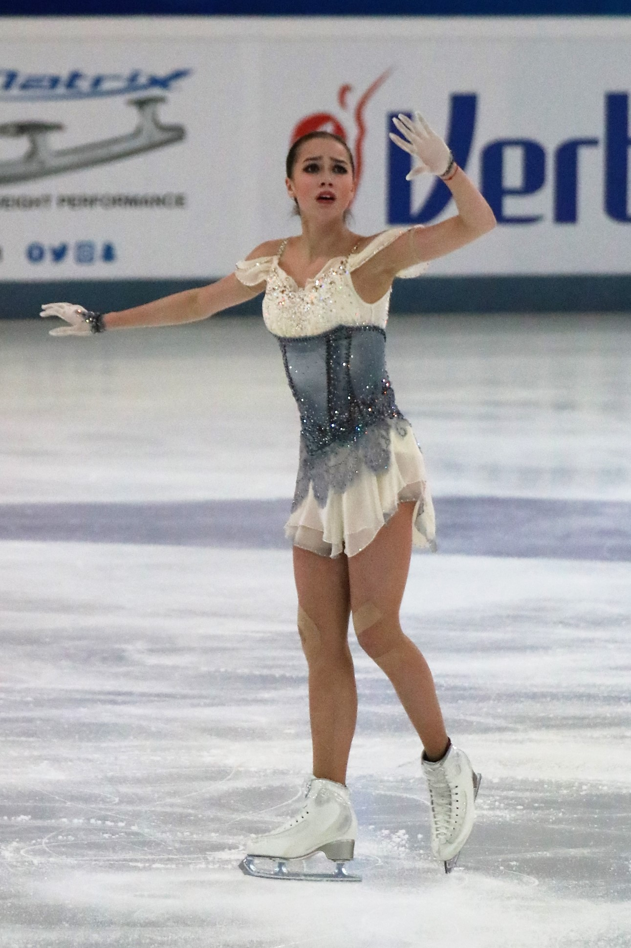 Алина Загитова на чемпионате России по фигурному катанию на коньках 2019